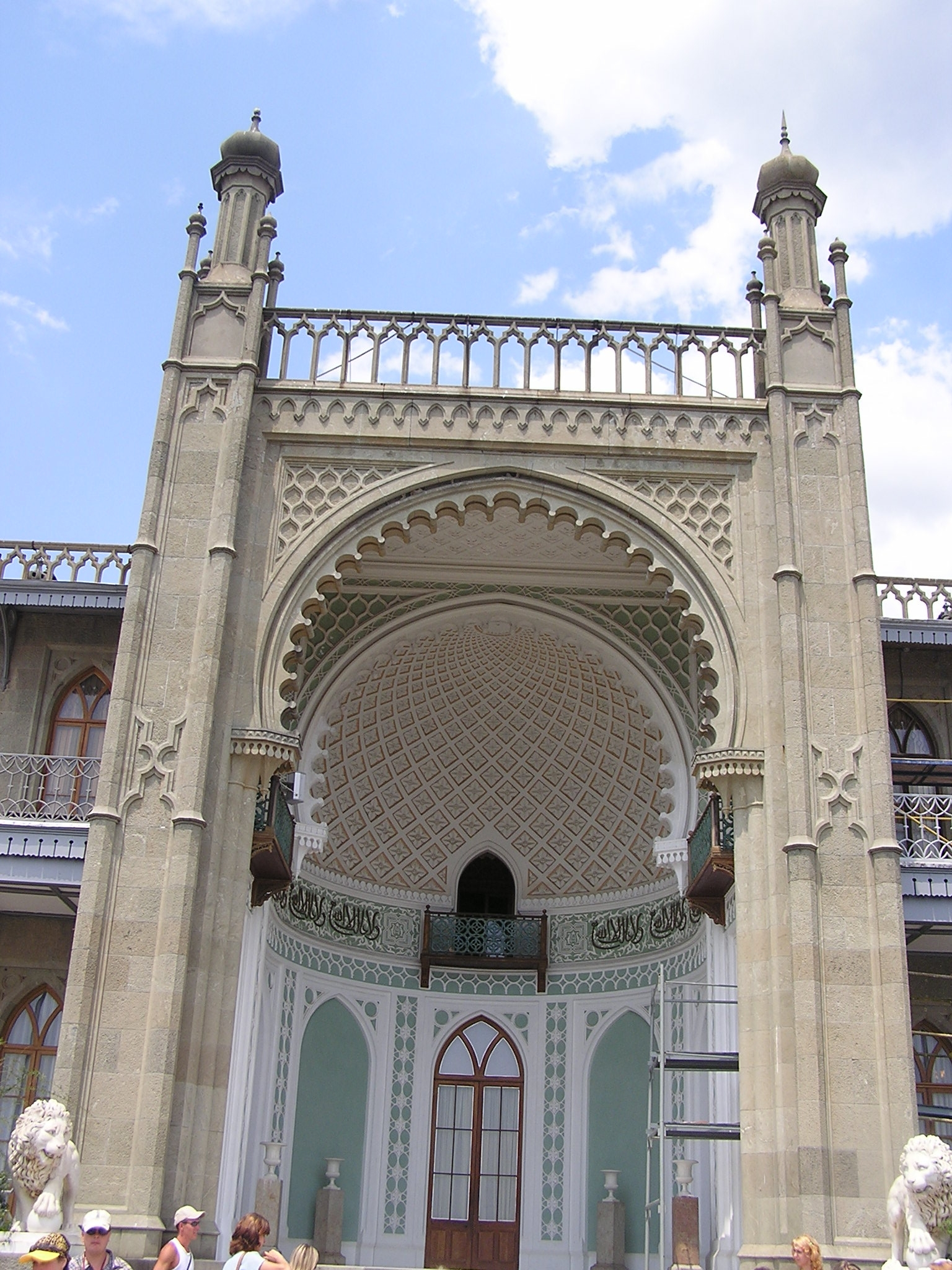 Алупка. Воронцовский дворец